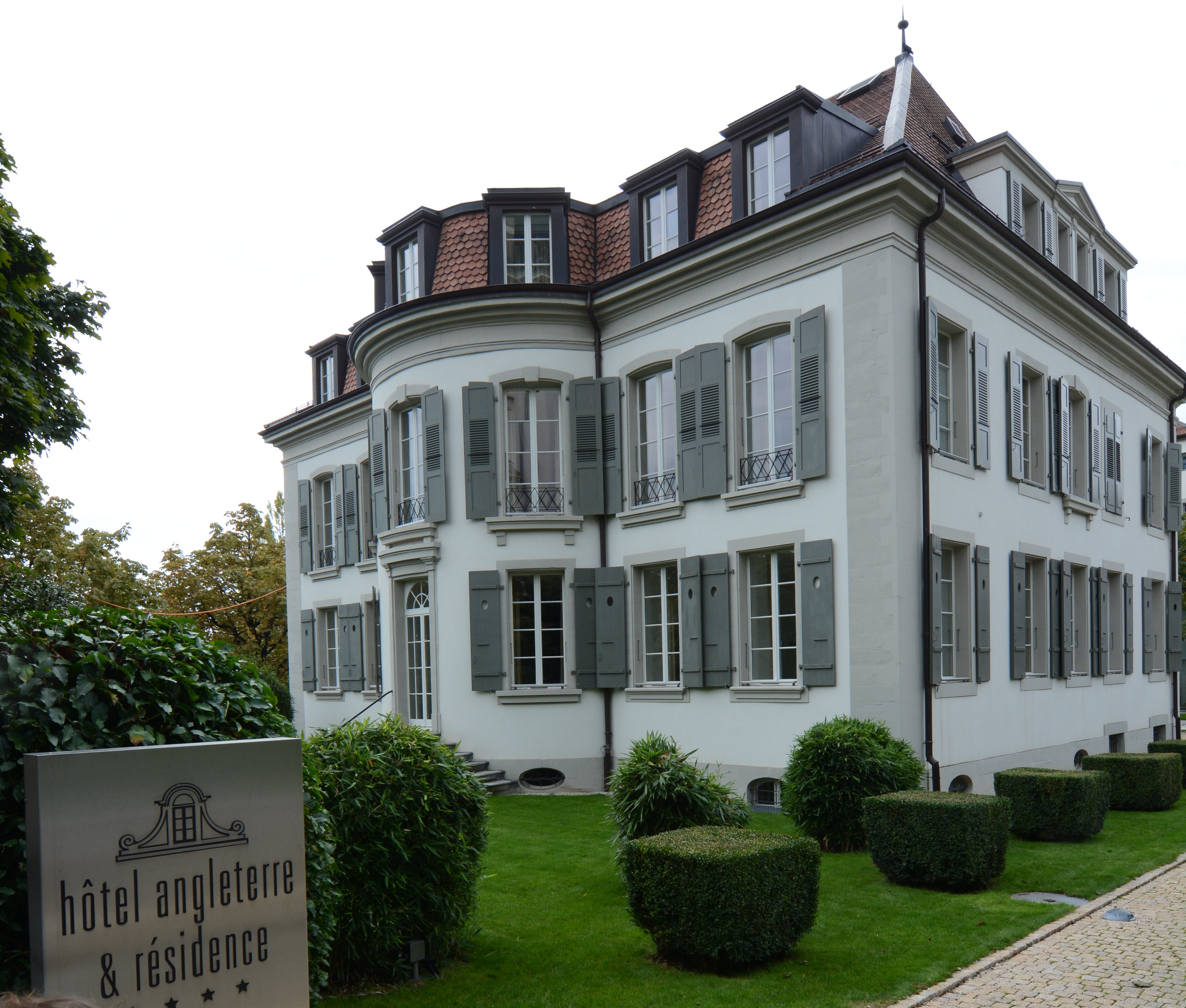 Das Maison Panchaud, Hotel Angleterre & Résidence Lausanne,. Architekt: Alexandre Perregaux